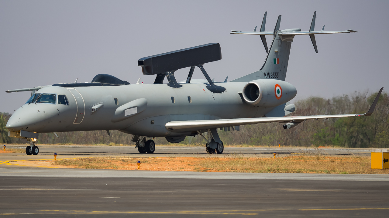 KW3555 AWACS IAF